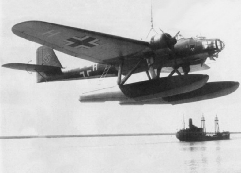 A German Heinkel He 115B seaplane of 1./Küstenfliegergruppe 206 on a crane.